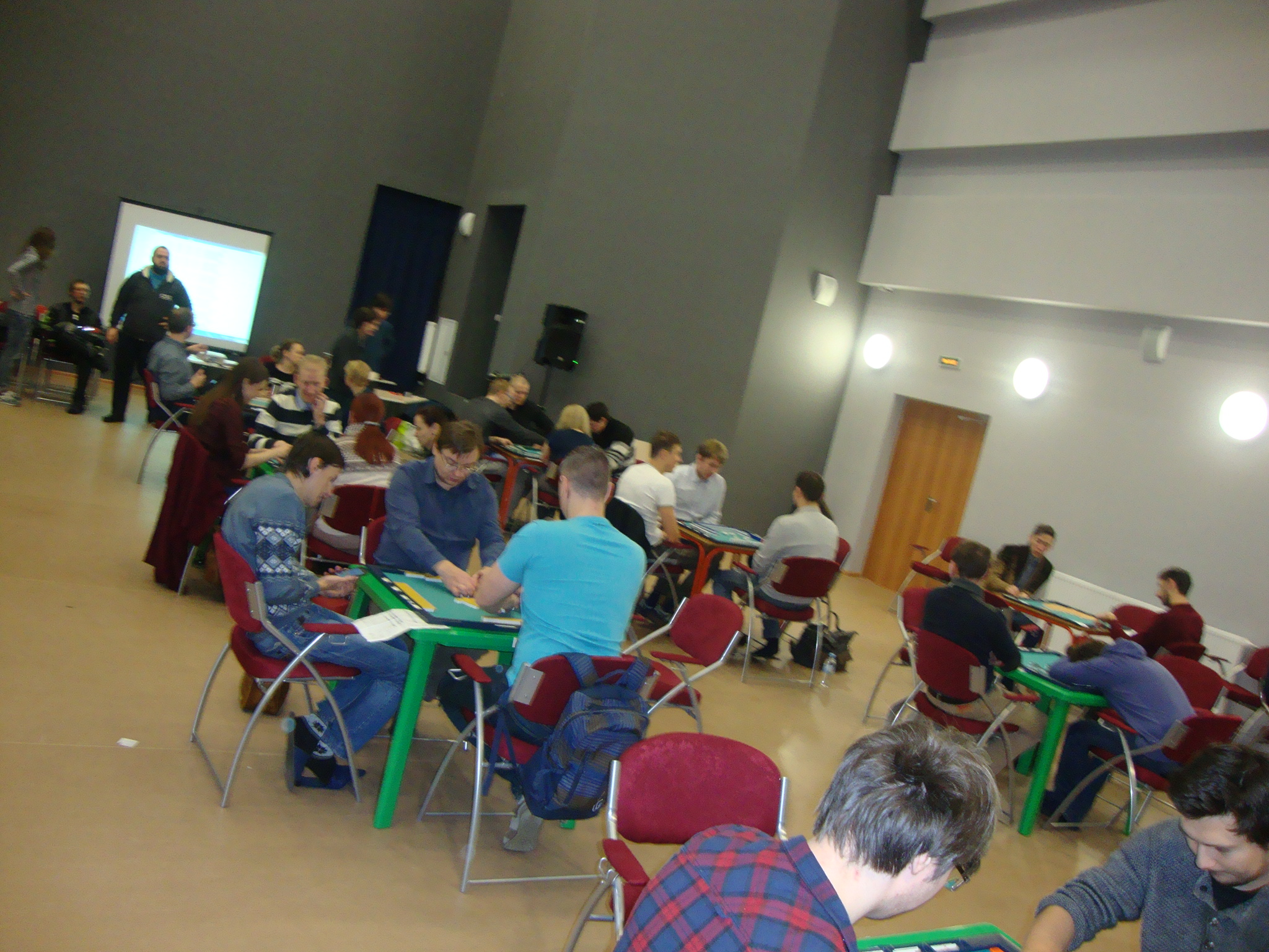 Северный кубок. Второй открытый чемпионат Санкт-Петербурга и Ленинградской обл. по риичи (2016)